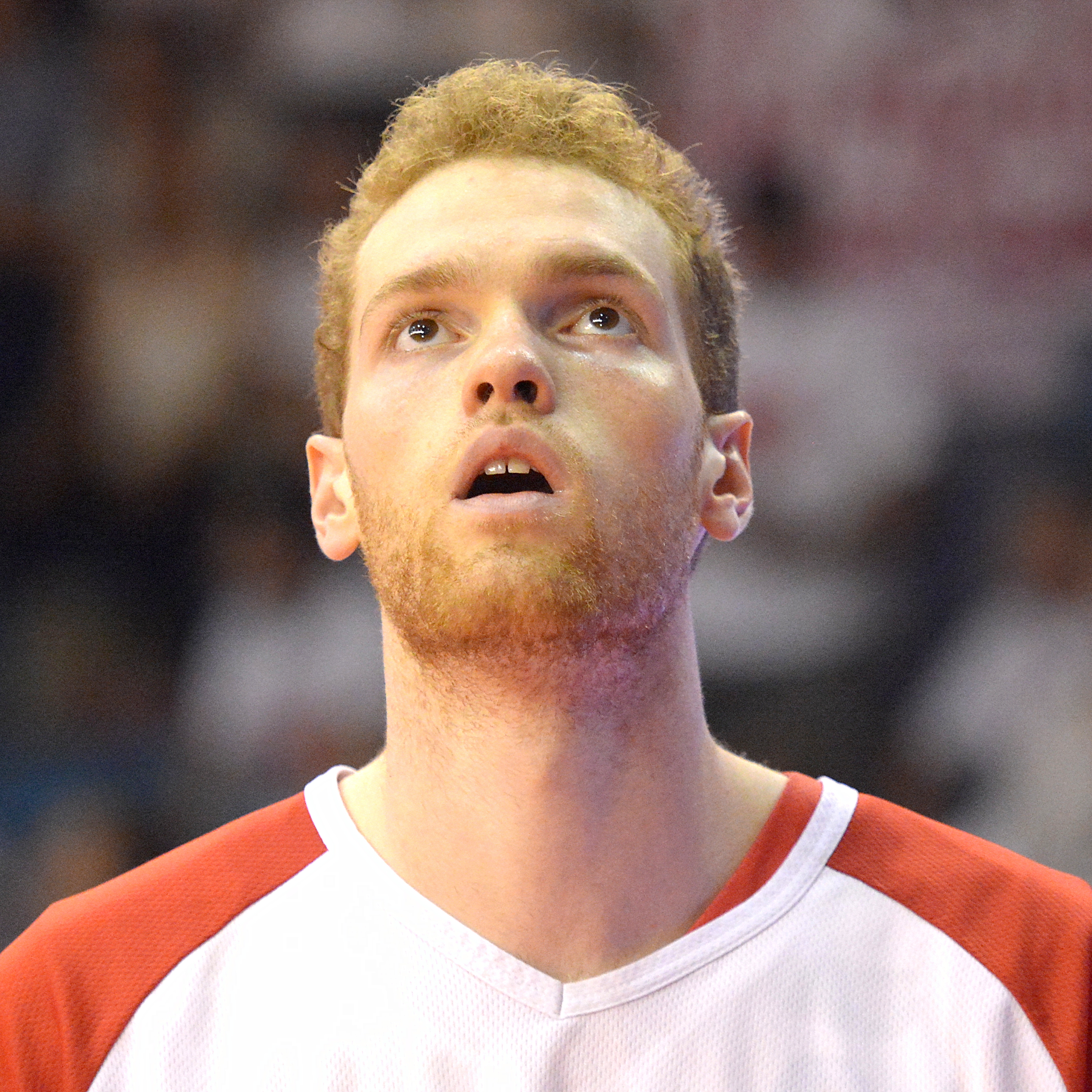 Giovanni Pini con la maglia di Reggio Emilia nel campionato 2014/2015